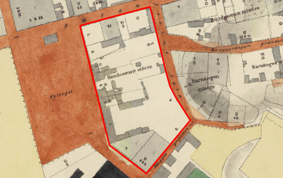 Del av Stockholmskarta visande kvarteret Bondesonen större